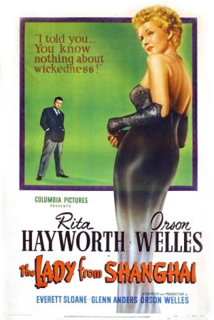 poster promocional de la Dama de Shangai